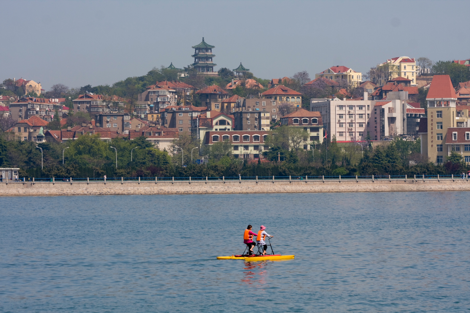 Qingdao, China